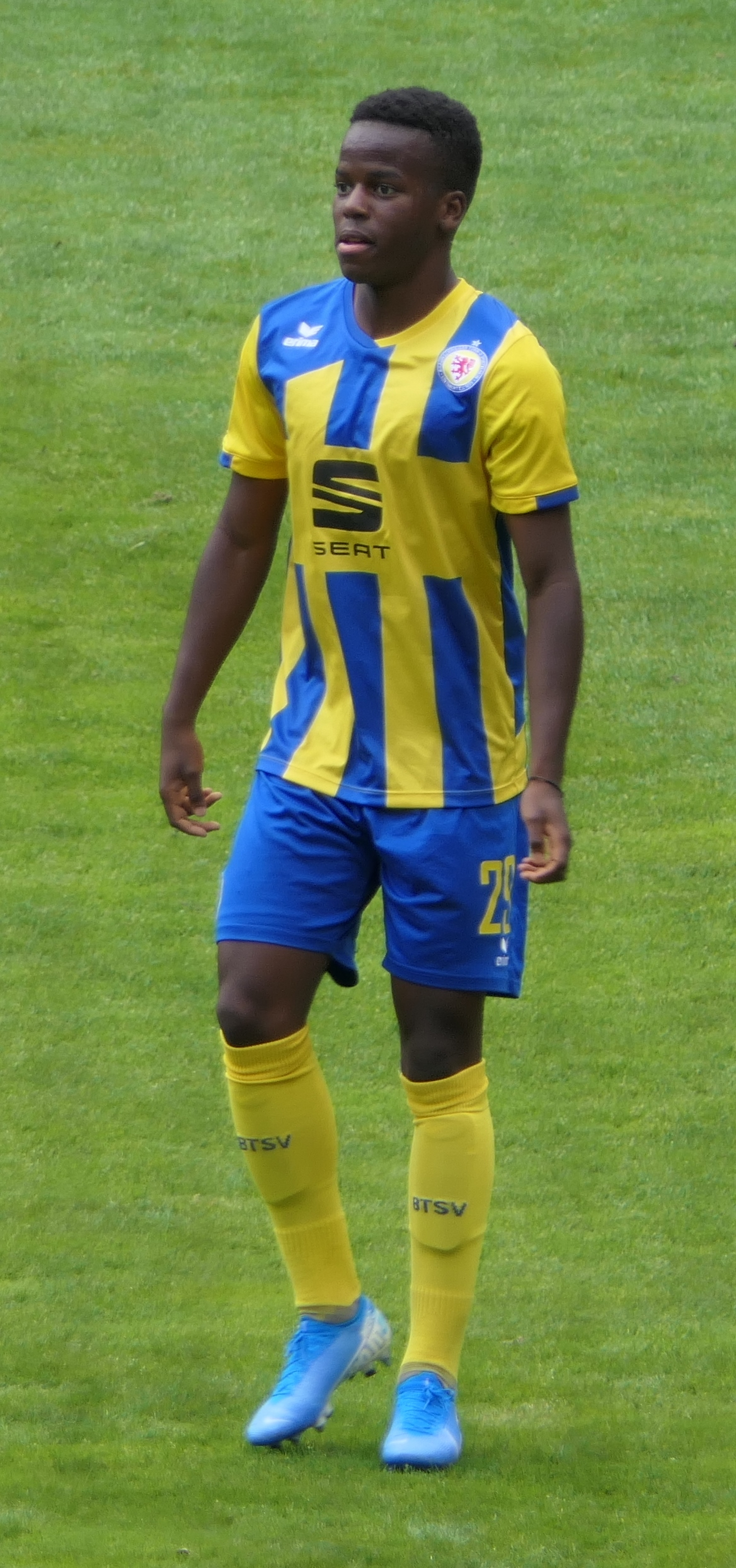 Der Fussballprofi Alfons Amade im Trikot von Eintracht Braunschweig beim Auswärtsspiel gegen den 1.FC Kaiserslautern am 18.08.2019.